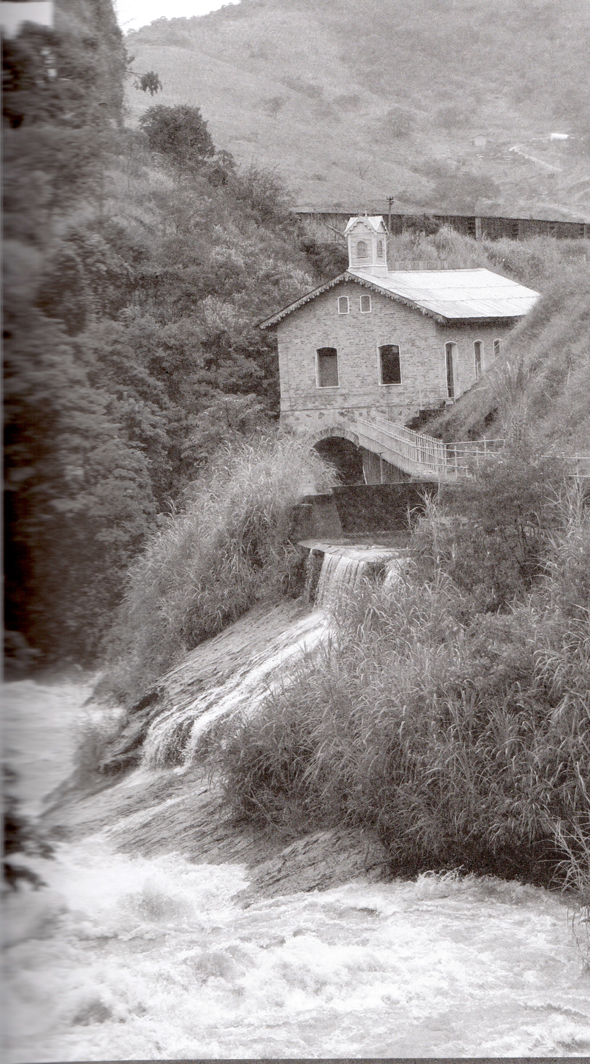 Usina de Marmelos, a primeira usina hidrelétrica da América do Sul.